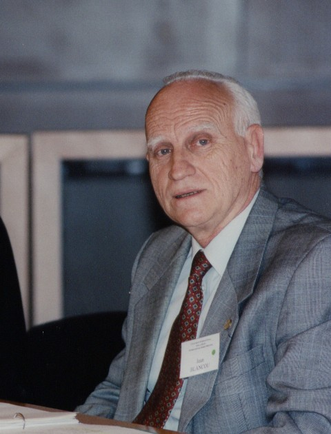 Jean Blancou, docteur vétérinaire, directeur de l'Organisation mondiale de la santé animale